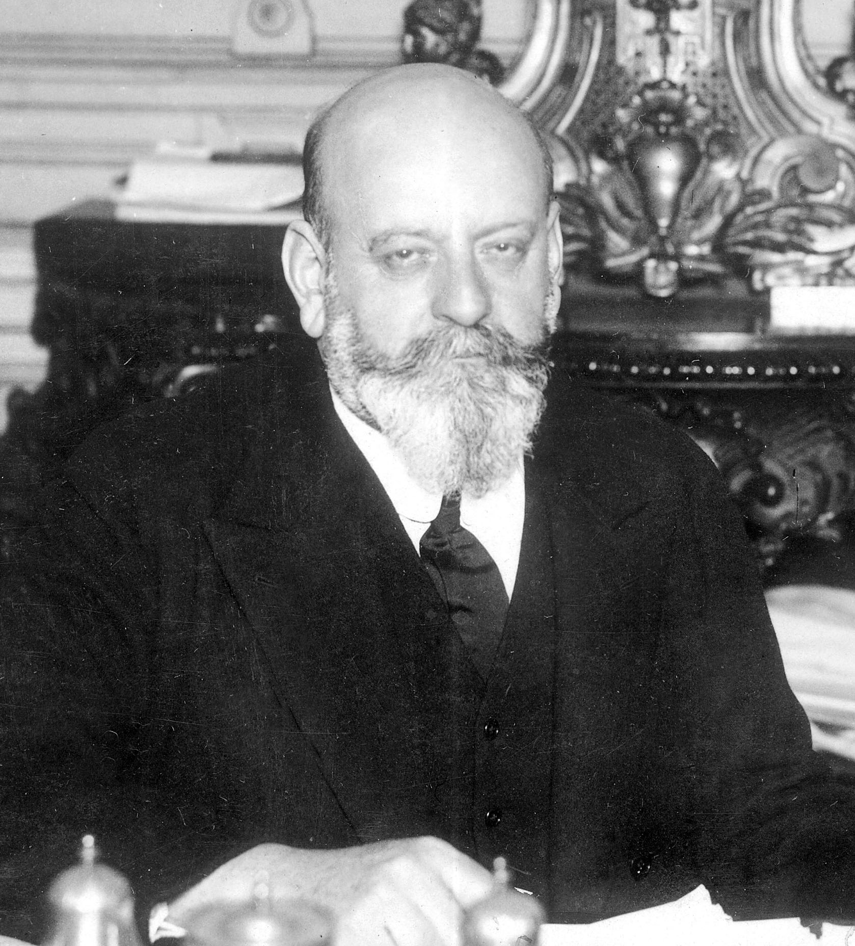 Emiliano Figueroa Larraín, Presidente de Chile (1925-1927).